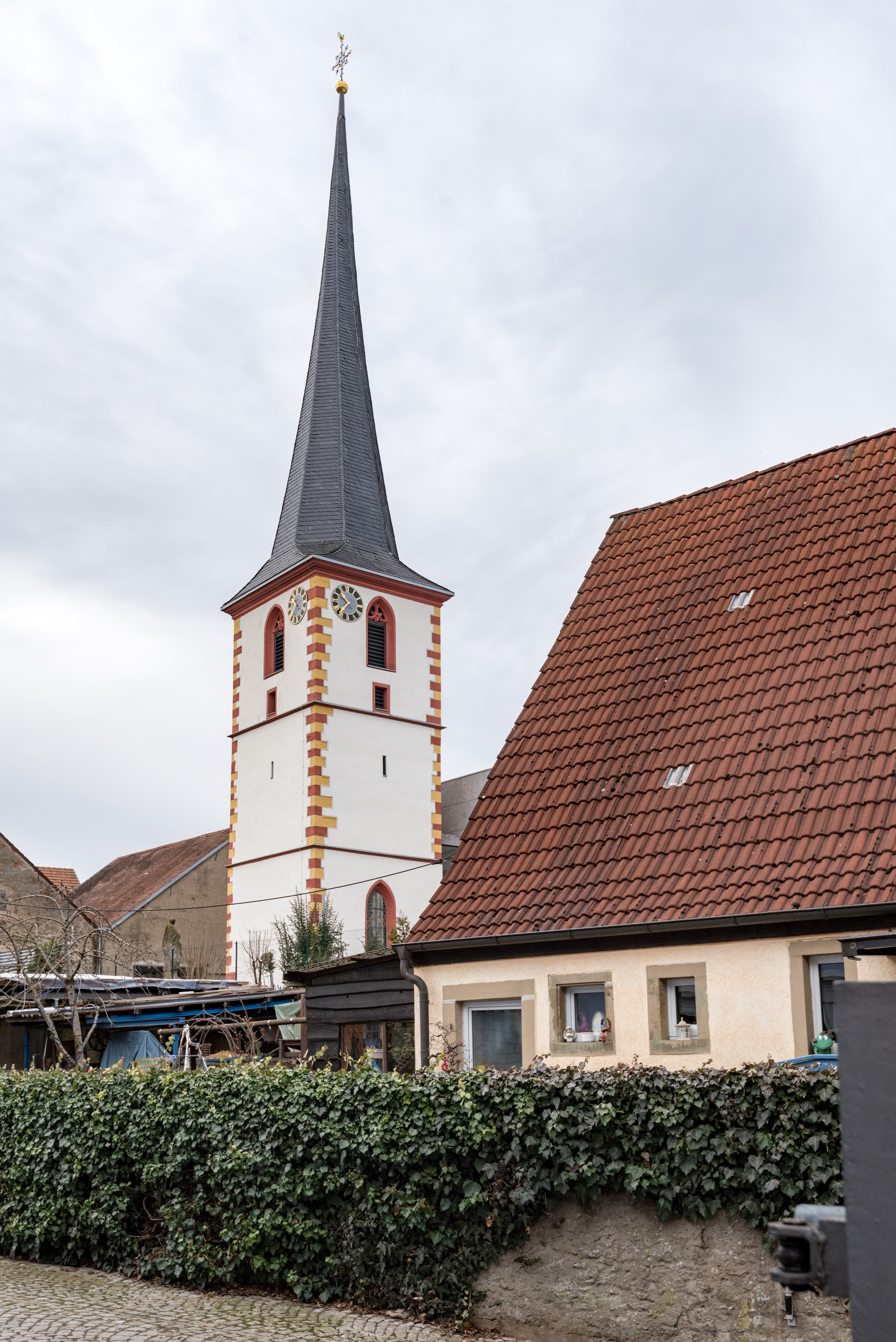 Waigolshausen, Kirchstraße 6, Kirchturm